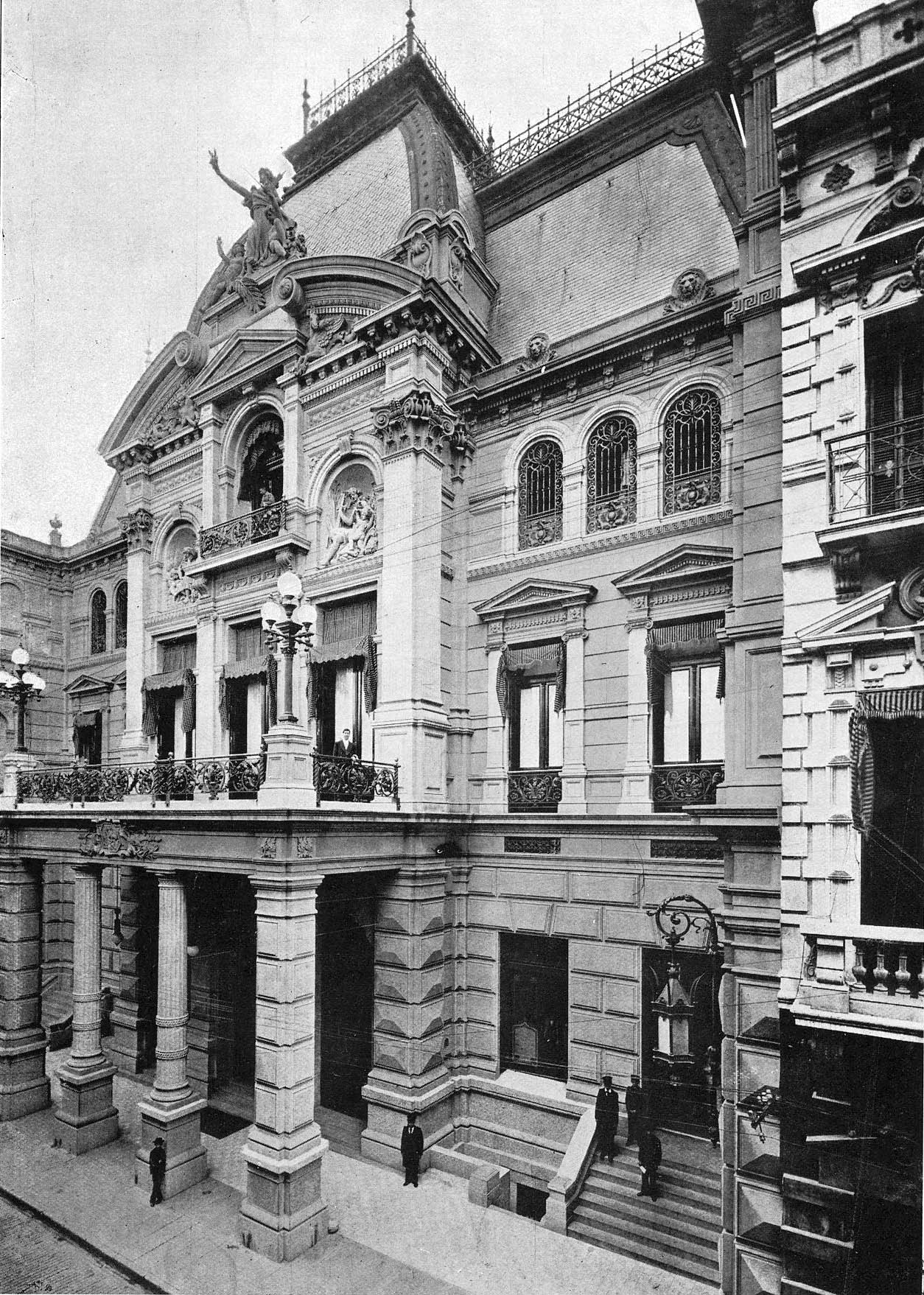 Sede social del Jockey Club de Buenos Aires (Argentina). Este edificio fue inaugurado en 1897, proyectado por el arquitecto Manuel Turner. Fue incendiado el 15 de abril de 1953 por militantes peronistas. Hoy en su lugar se encuentra la Galería Jardín, un paseo comercial con torres de oficinas.